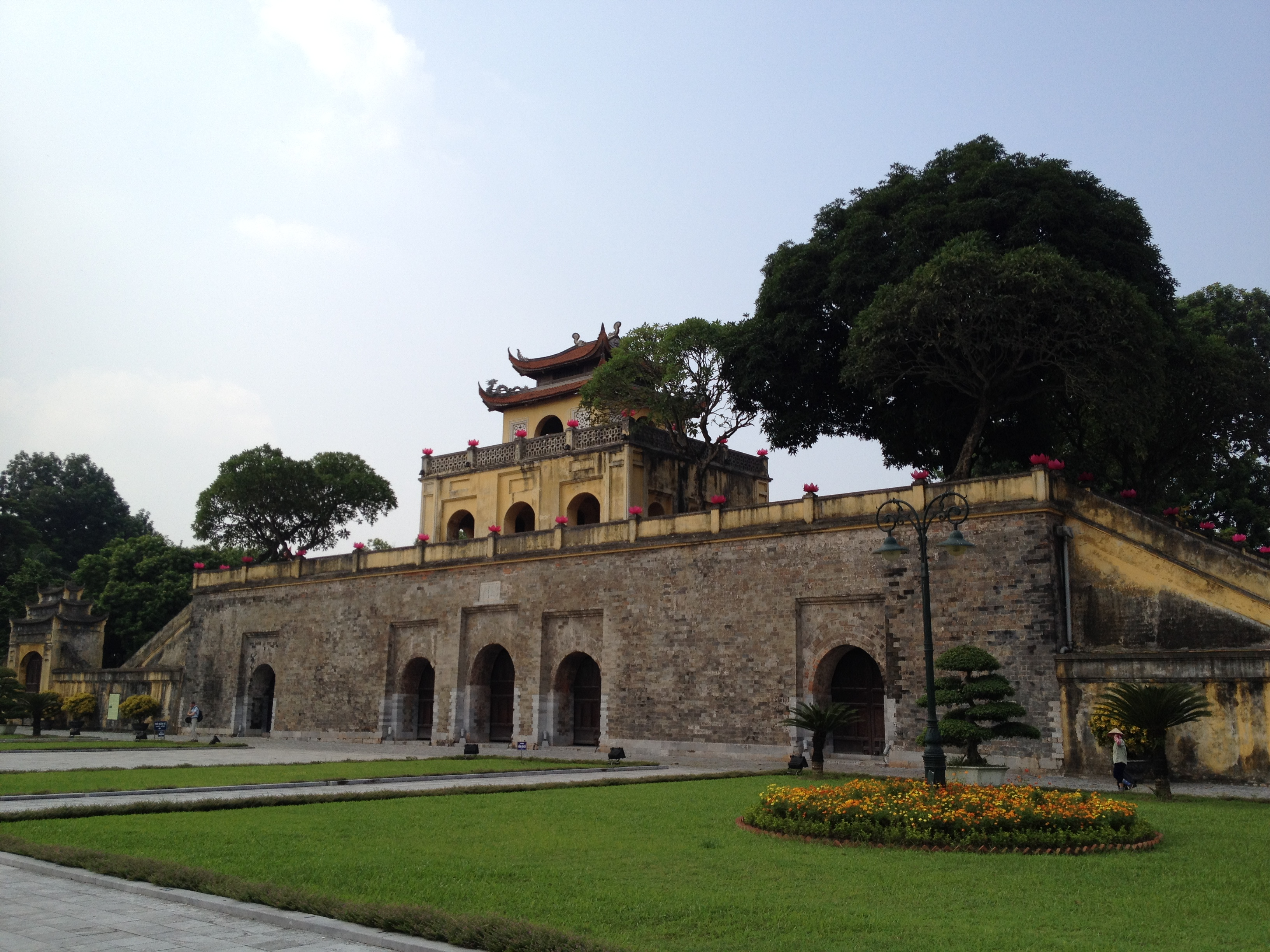 Hoàng thành Thăng Long, Hà Nội, Việt Nam.